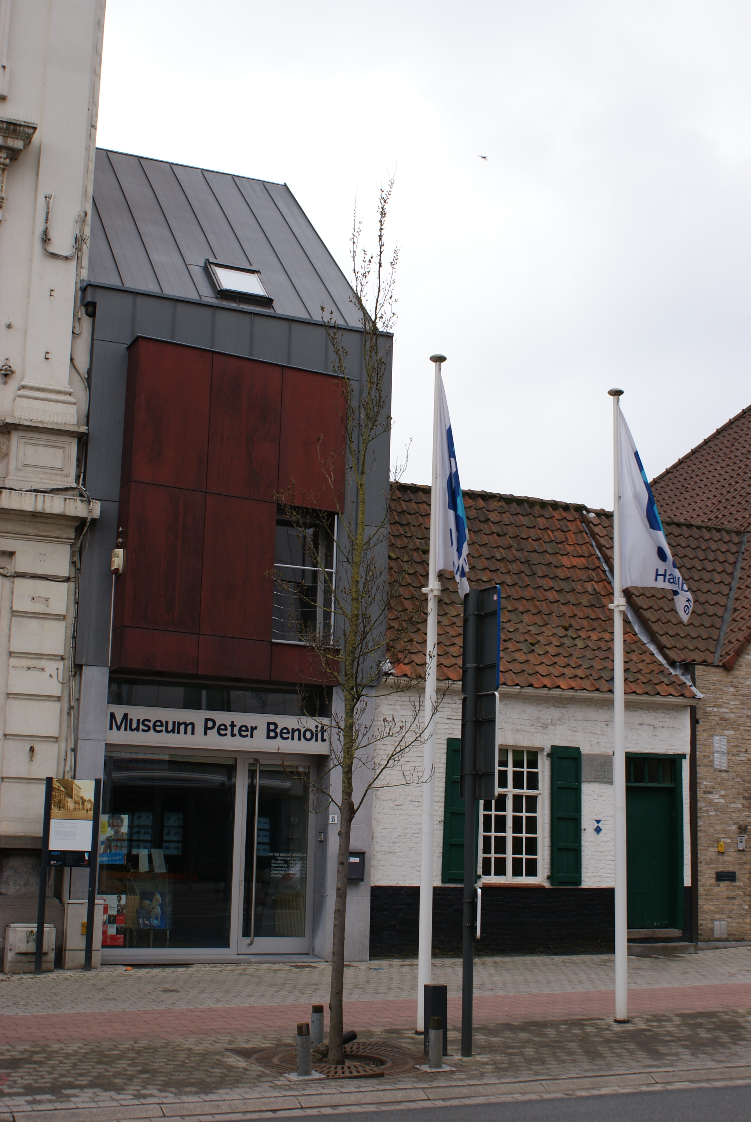 Geboortehuis Peter Benoit (museum)